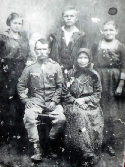 Српски (ћирилица): Словачка породица Ципар доселила се са Малих Карпата у регију Прњавора.